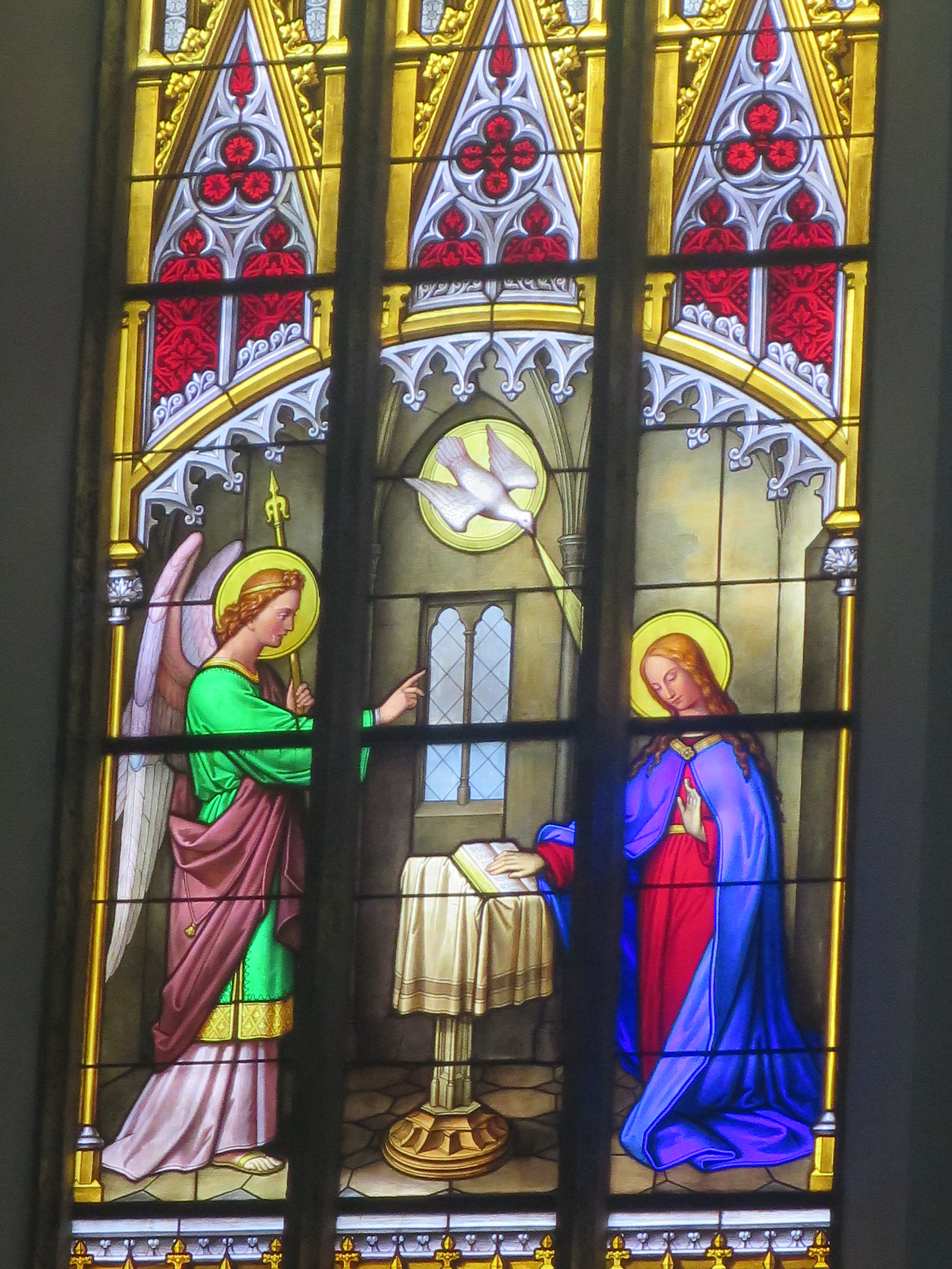 Glasgemälde im Chorraum rechts (Verkündigung).